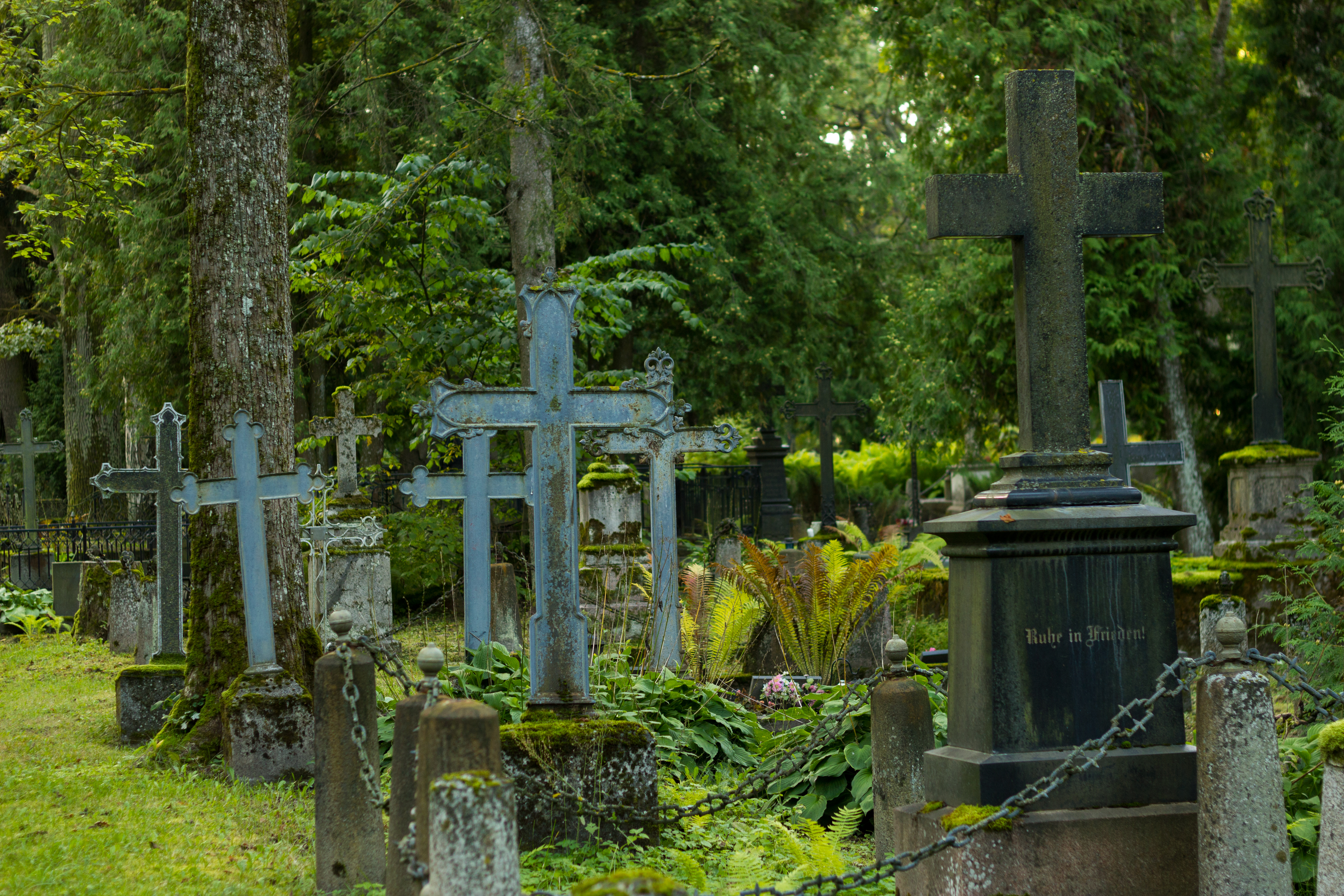 Kalmistule iseomased vaated.